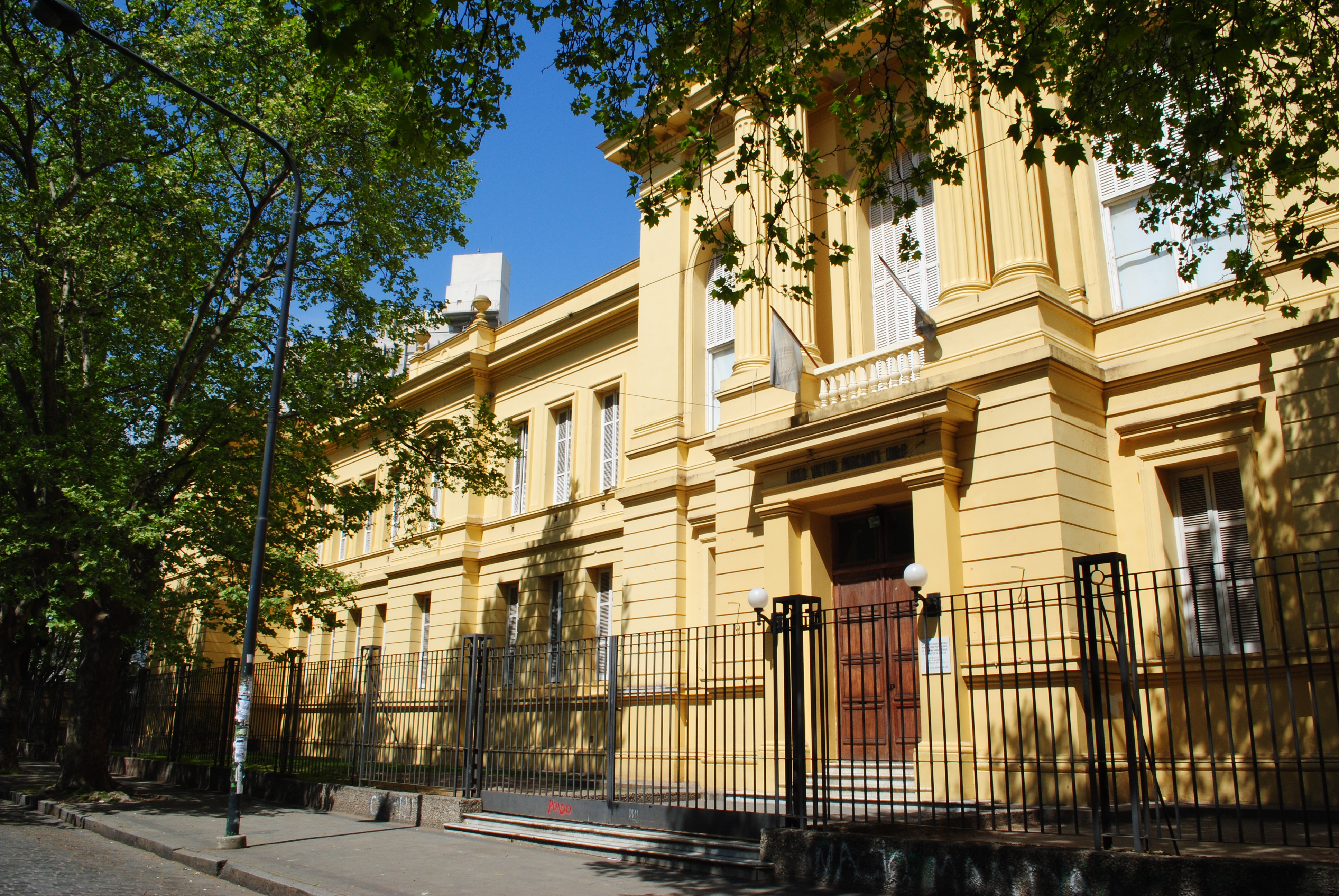 Escuela Graduada Liceo "Victor Mercante"